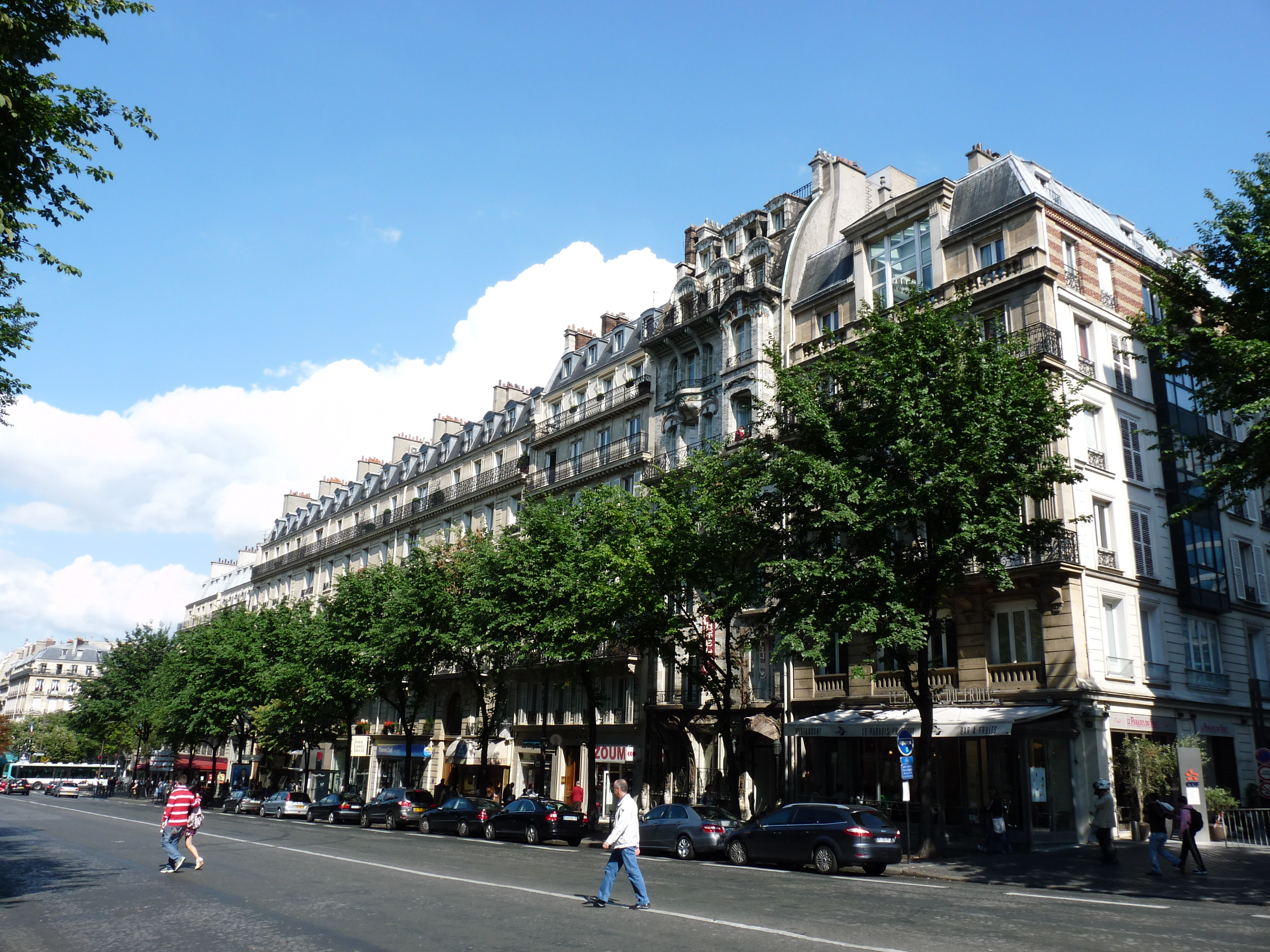 L'avenue de Wagram à Paris. À gauche, la place des Ternes.